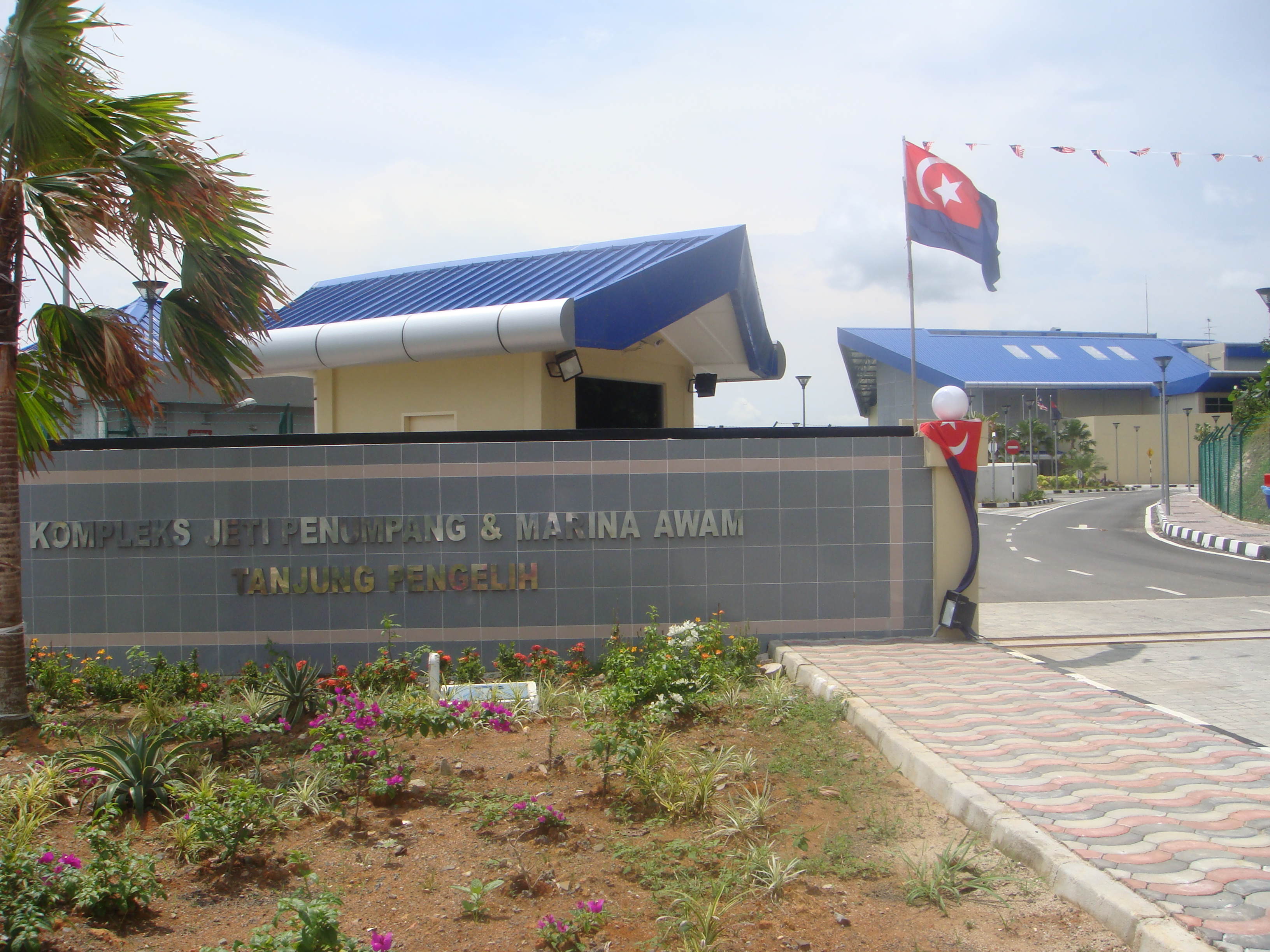 タンジュン・プングリ桟橋入口